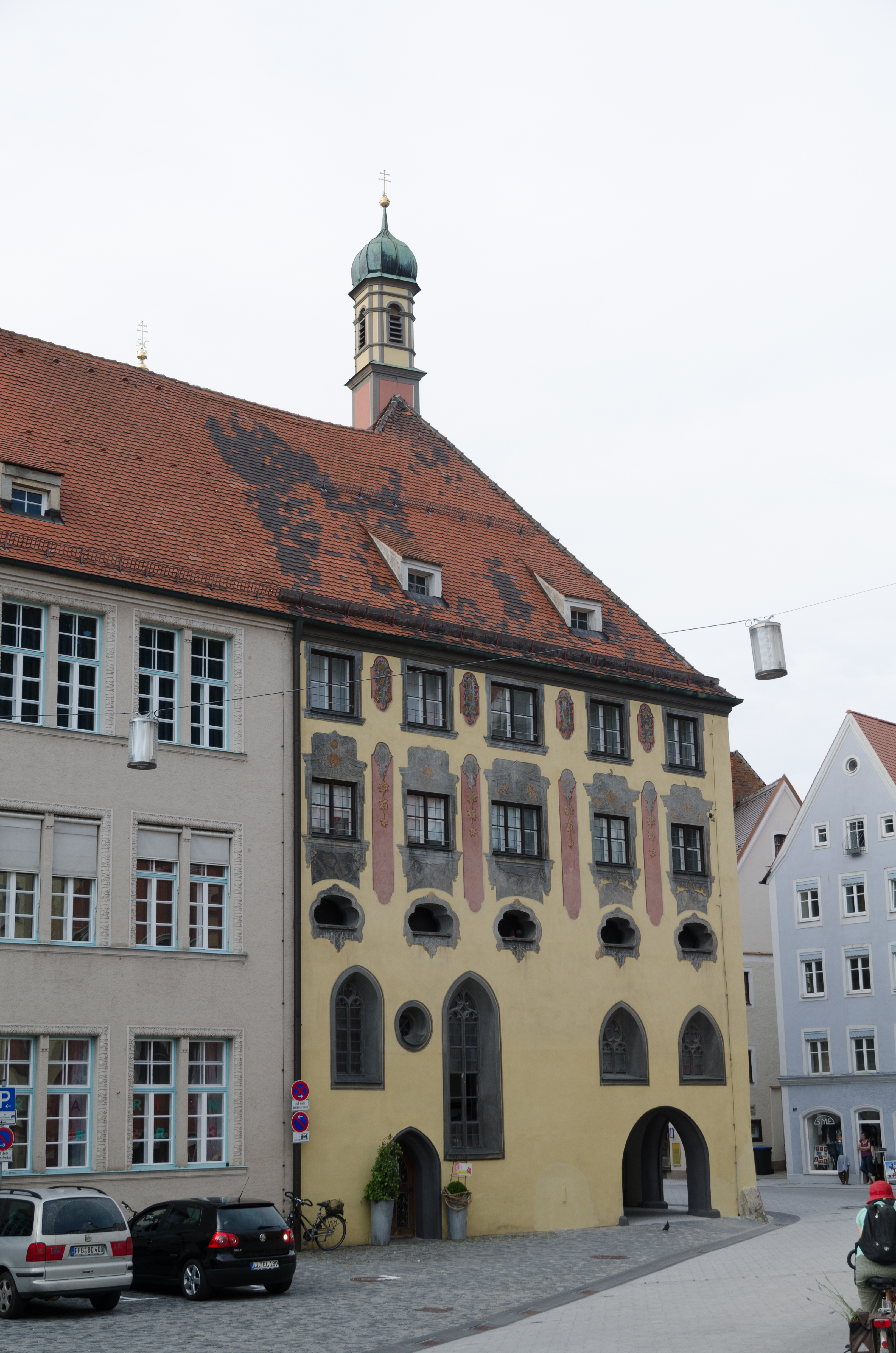 Landsberg am Lech, Hubert-von-Herkomer-Straße 110